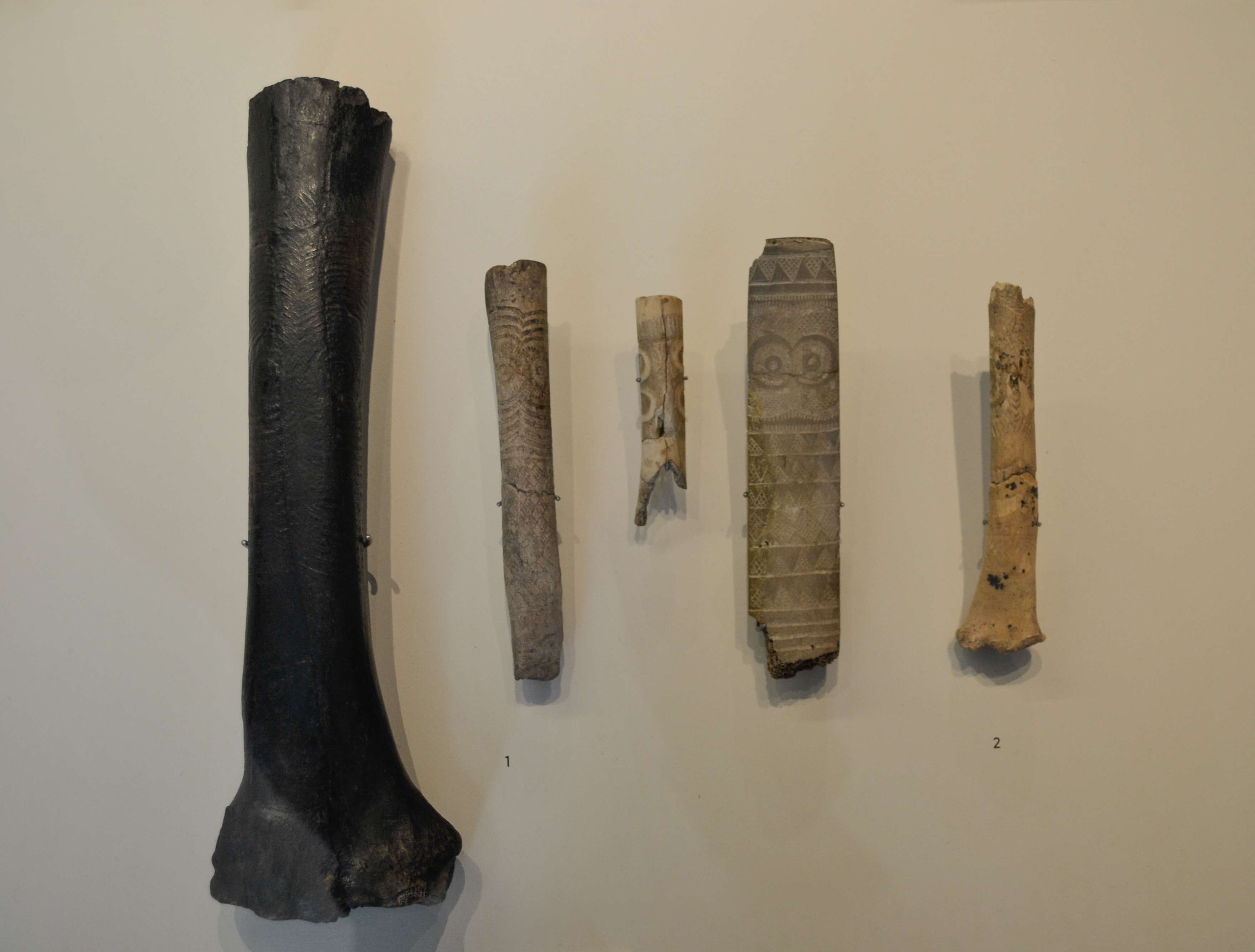 Ídolos oculados sobre hueso. Neolítico Final/Calcolítico. Museo Arqueológico Nacional de España. Descripciones de izquierda a derecha: Idolo oculado sobre hueso largo (radio de caballo). Tiene grabados dos ojos. Procedencia: Almizaraque, Cuevas del Almanzora (Almería). Longitud: 26,30 cm; grosor: 3,50 cm; anchura máxima: 7,50 cm. Nº inv. 1984/172/30/45. Ídolo oculado realizado en hueso largo (radio de ovicáprido). Fractura mesial e inferior. 2500-2100 a. C. Procedencia: Almizaraque, Cuevas del Almanzora (Almería). Longitud: 13,20 cm; anchura: 2 cm; grosor: 1,40 cm. Nº inv. 1984/172/21/92. Idolo oculado sobre hueso largo (radio de ovicáprido). Tiene grabados cuatro ojos separados por pequeños triángulos encadenados. Procedencia: Almizaraque, Cuevas del Almanzora (Almería). Longitud: 7,40 cm; grosor: 0,90 cm; anchura máxima: 1,70 cm. Nº inv. 1984/172/30/49. Ídolo oculado realizado sobre costilla. Decorado con triángulos reticulados y ojos en franjas. Presenta alteración térmica y diversas fracturas transversales. Procedencia: Almizaraque, Cuevas del Almanzora (Almería). Longitud: 13,90 cm; anchura: 3 cm; grosor: 0,90 cm. Nº inv. 1984/172/21/91. Idolo oculado realizado sobre un fragmento proximal del radio izquierdo de ovicáprido. Procedencia: Cueva de Juan Barbero, Tielmes (Madrid). Longitud: 7,40 cm; grosor: 0,90 cm; anchura máxima: 1,70 cm. Nº inv. 1984/172/30/49.